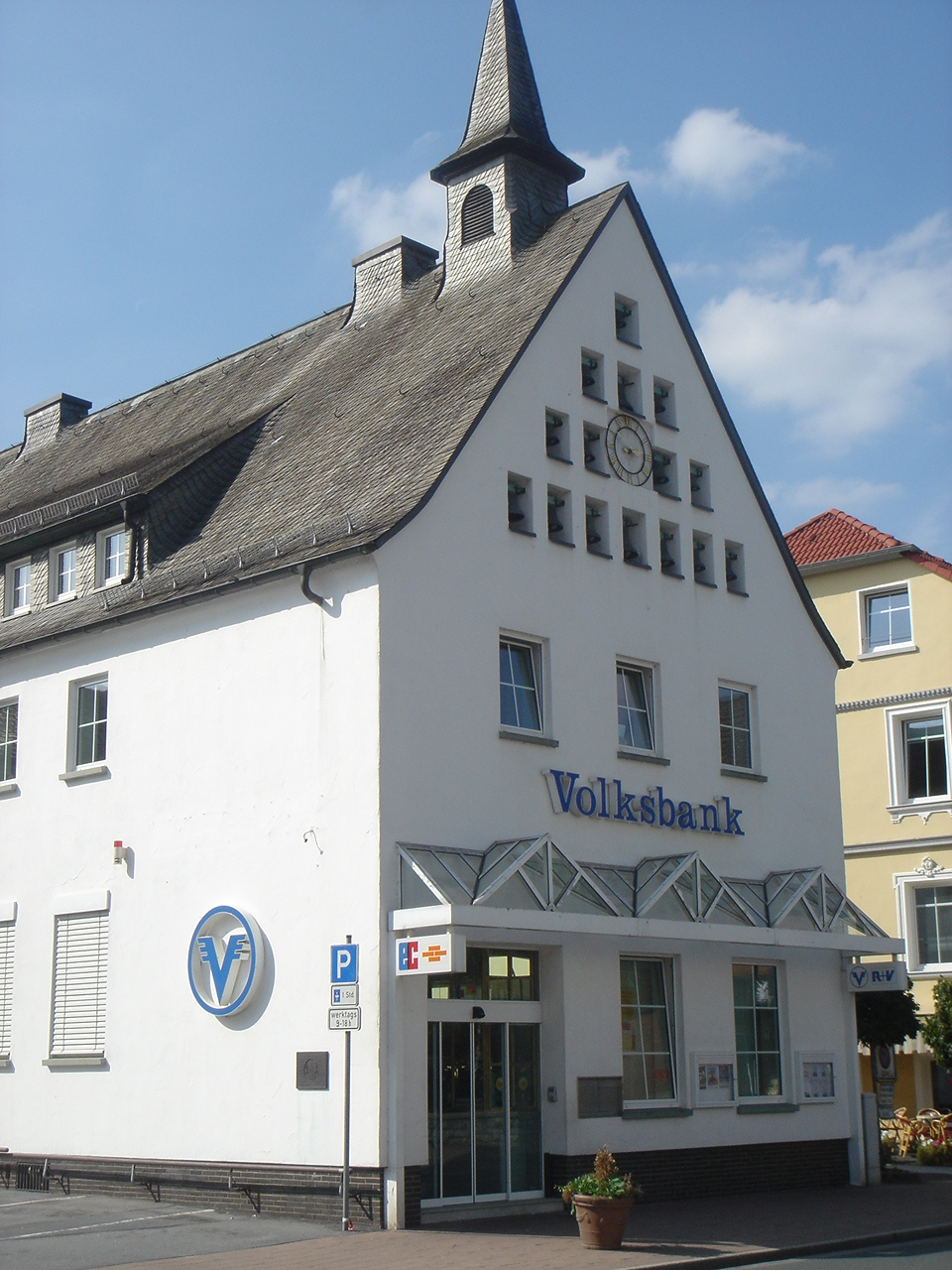 Altes Rathaus (1430)